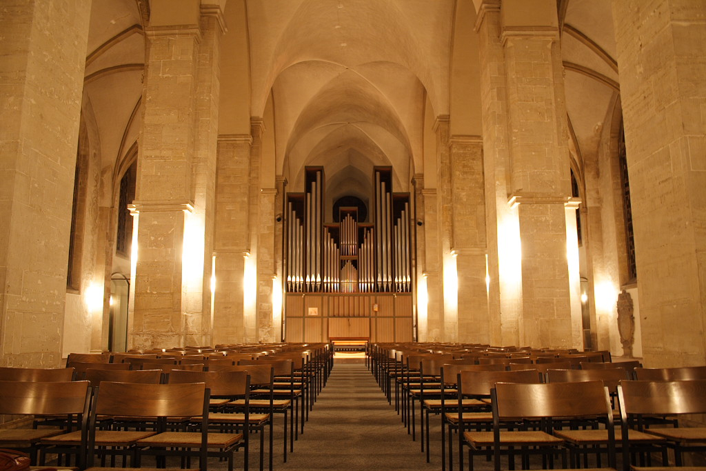 Innenansicht der Braunschweiger Andreaskirche/Interior view of the Andreaskirche in Braunschweig